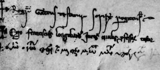 Firme di testimoni su un documento Messinese del 1266